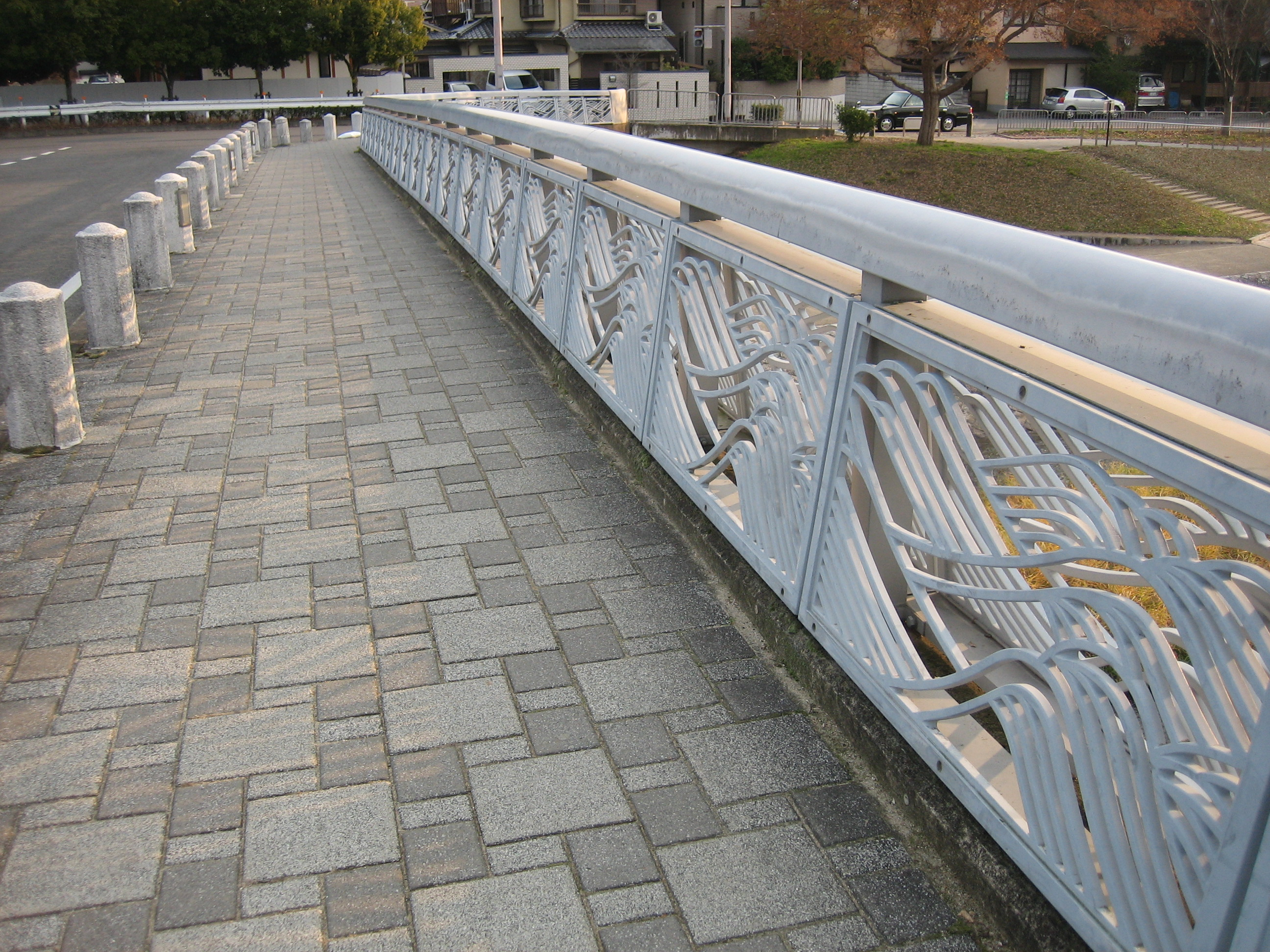 西賀茂橋を橋上から撮影